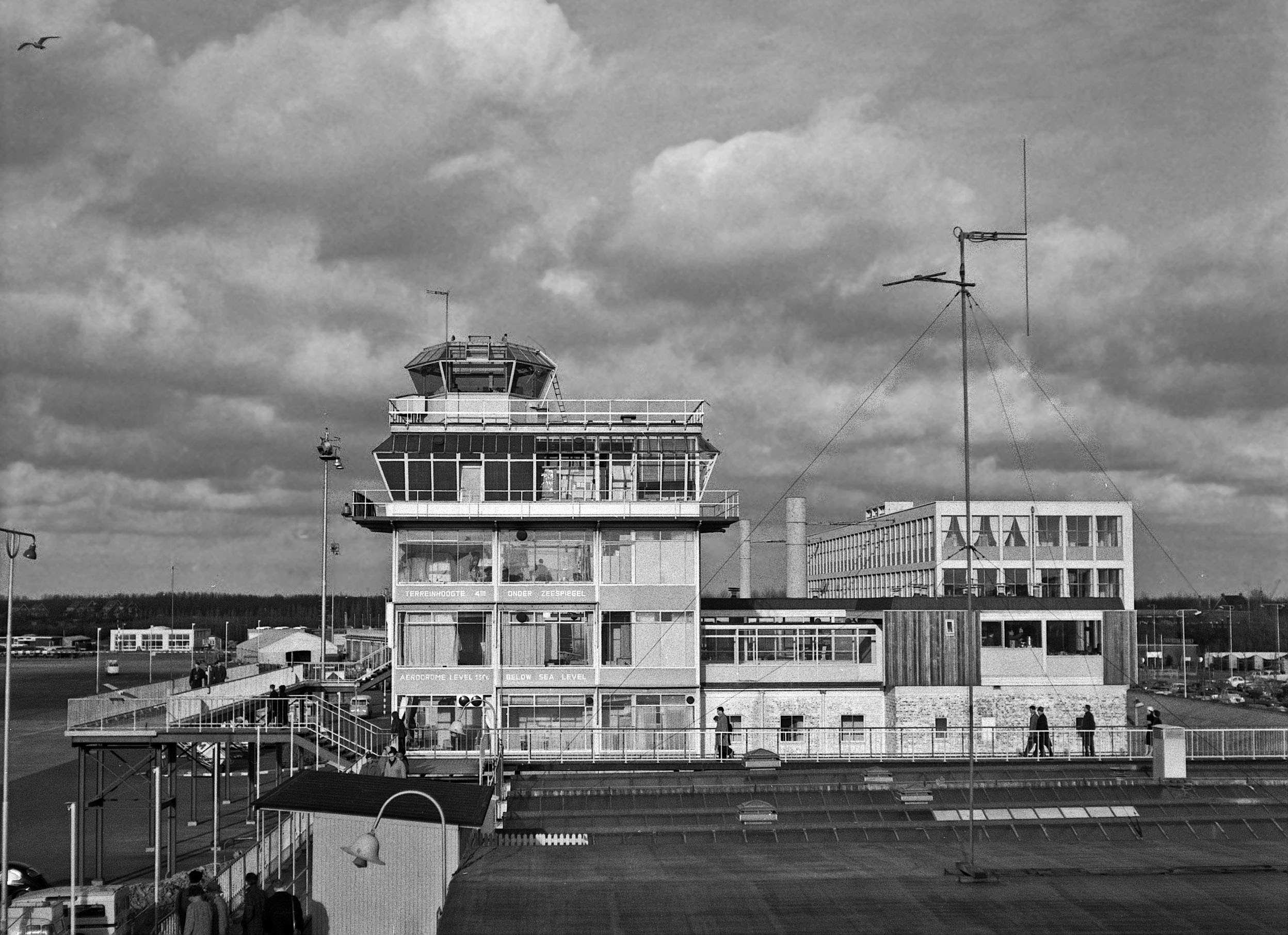 Februari 1960. Op het gebouw van de verkeerstoren staat: "terreinhoogte 4m onder zeespiegel" "aerodromelevel 13ft below sea level"